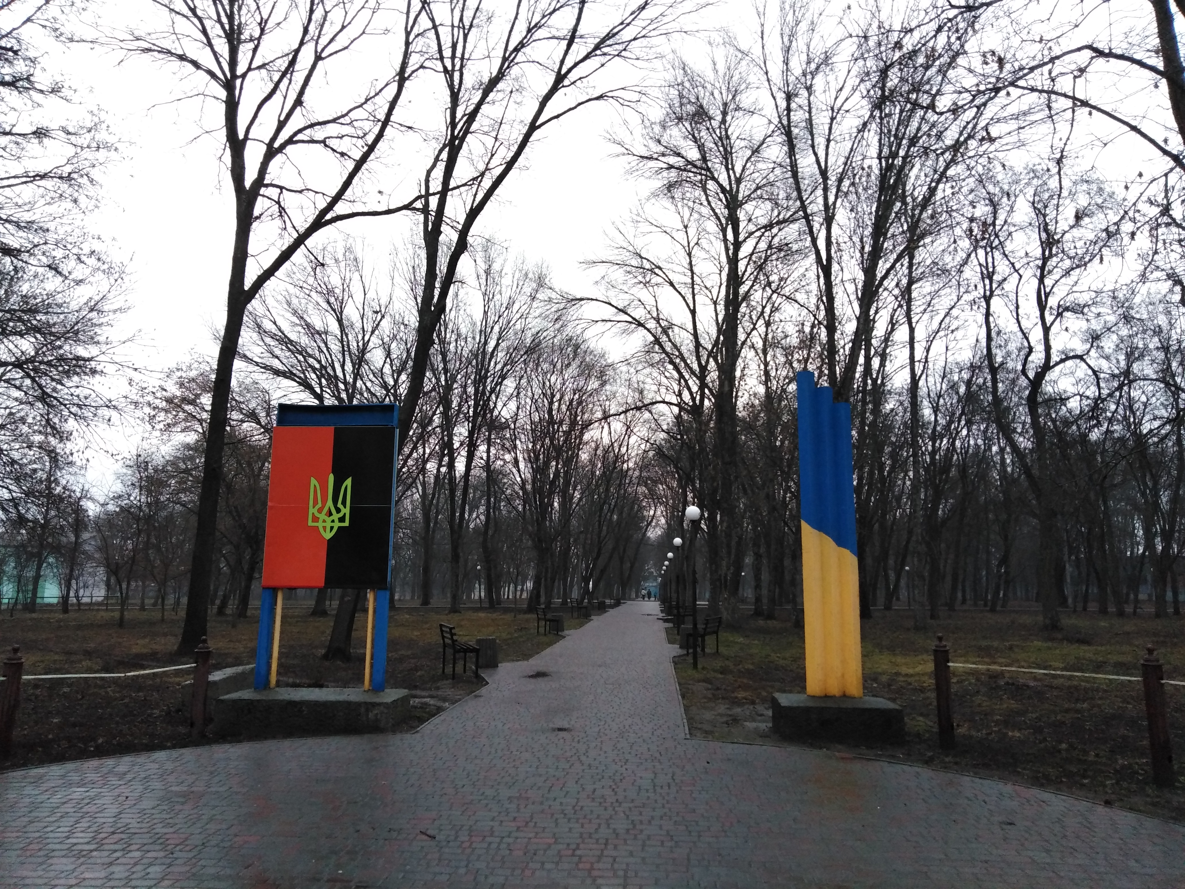 Україна, Полтавська область, м. Карлівка.